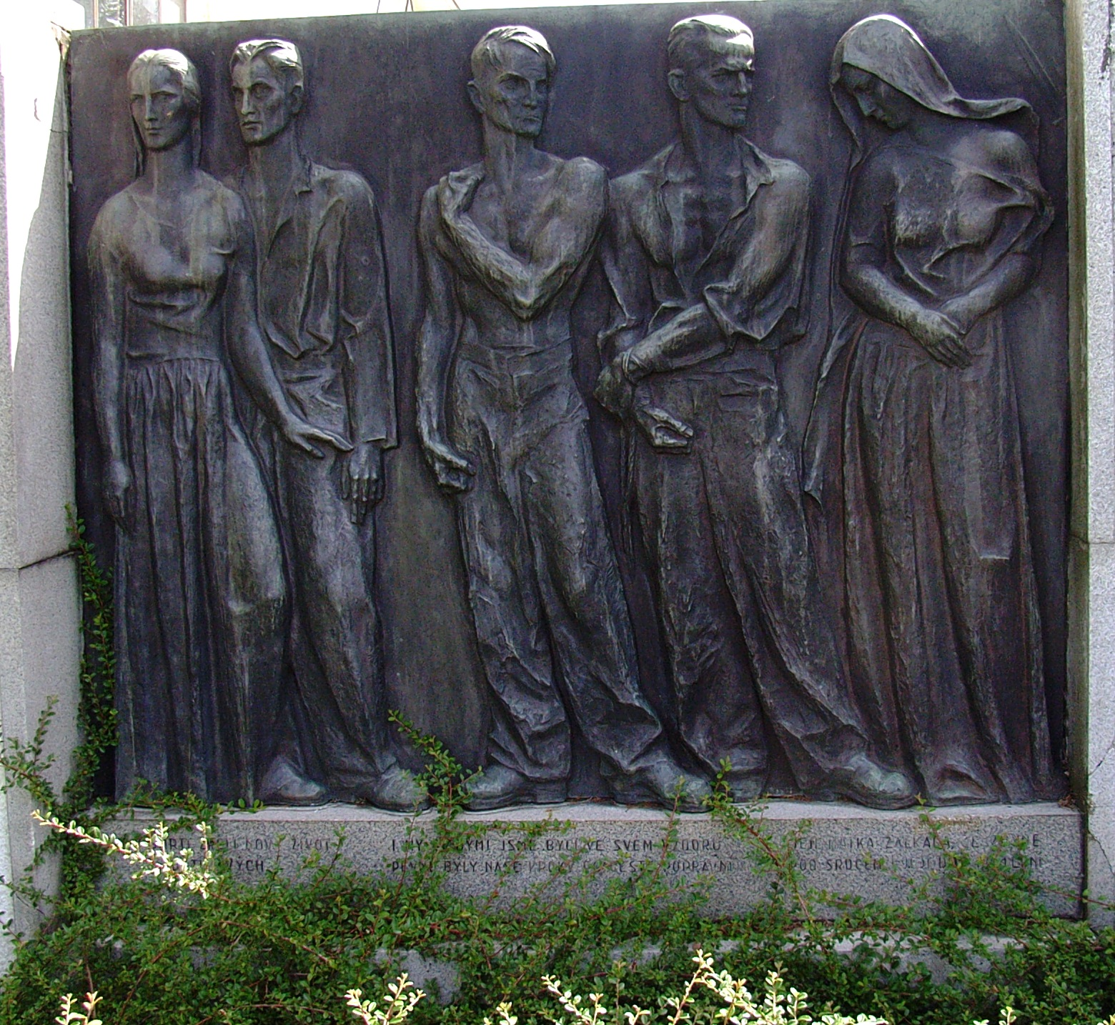 Plastika u památníku popraveným (1942) v Táboře, dílo sochaře J. V. Duška